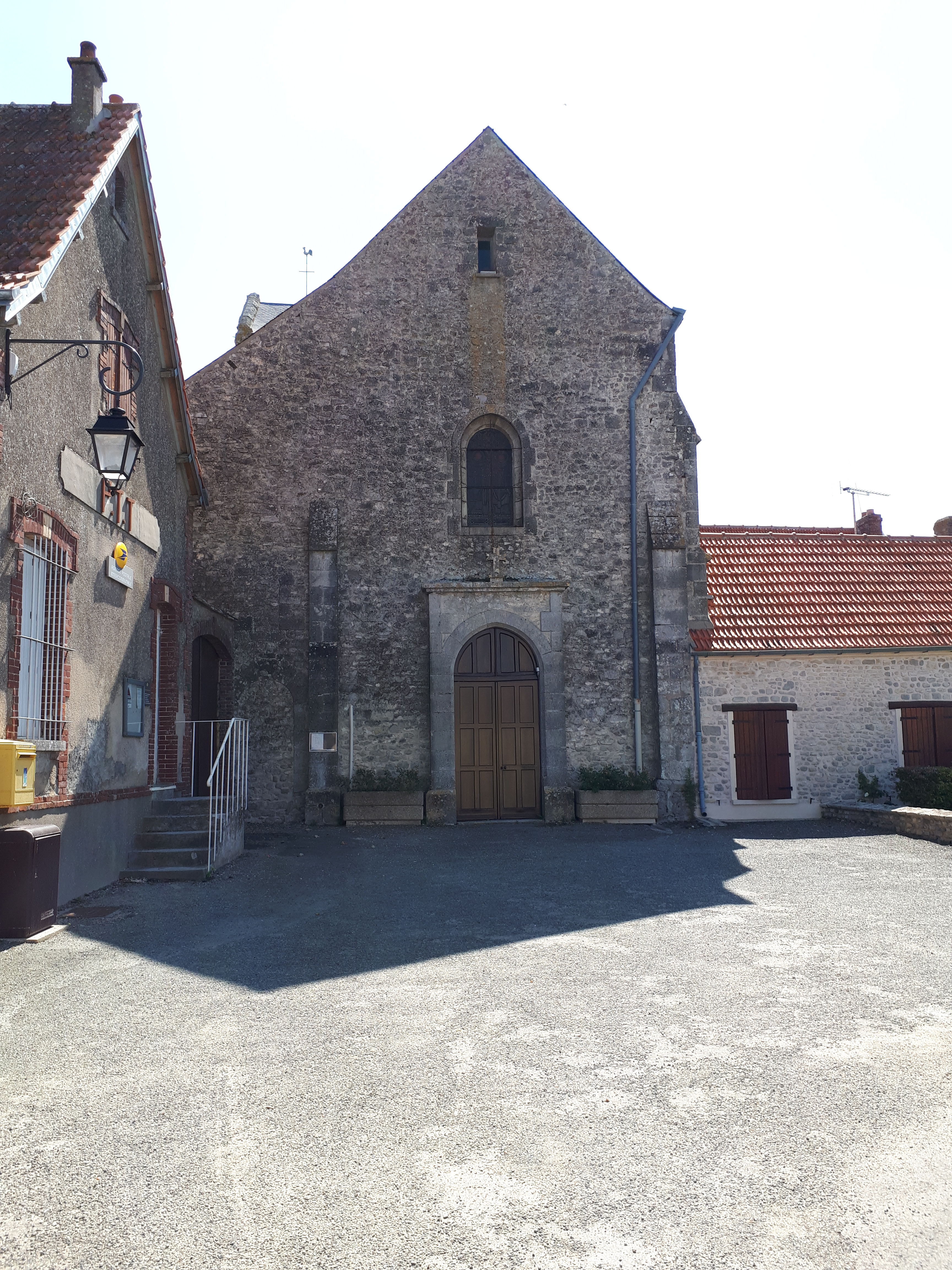 Église de Baudreville (Eure-et-Loir)